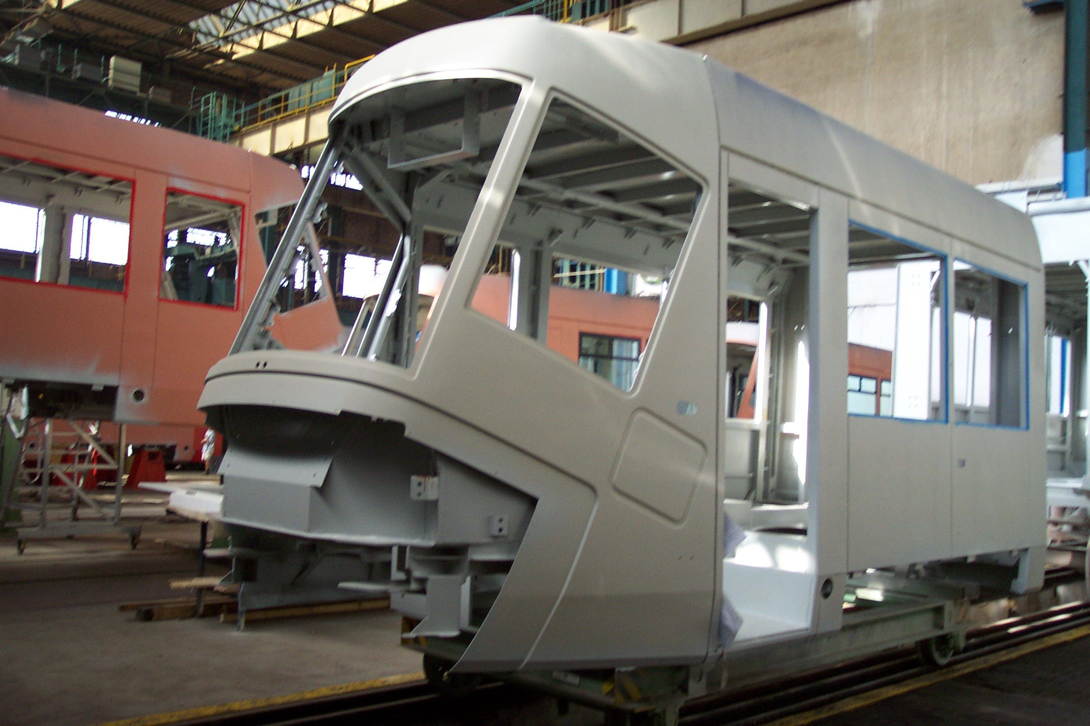 Plzeň, an unfinished tram type 14T/16T in Škoda factory - Plzeň, nedokončená tramvaj typu 14T/16T vyráběná v továrně společnosti Škoda